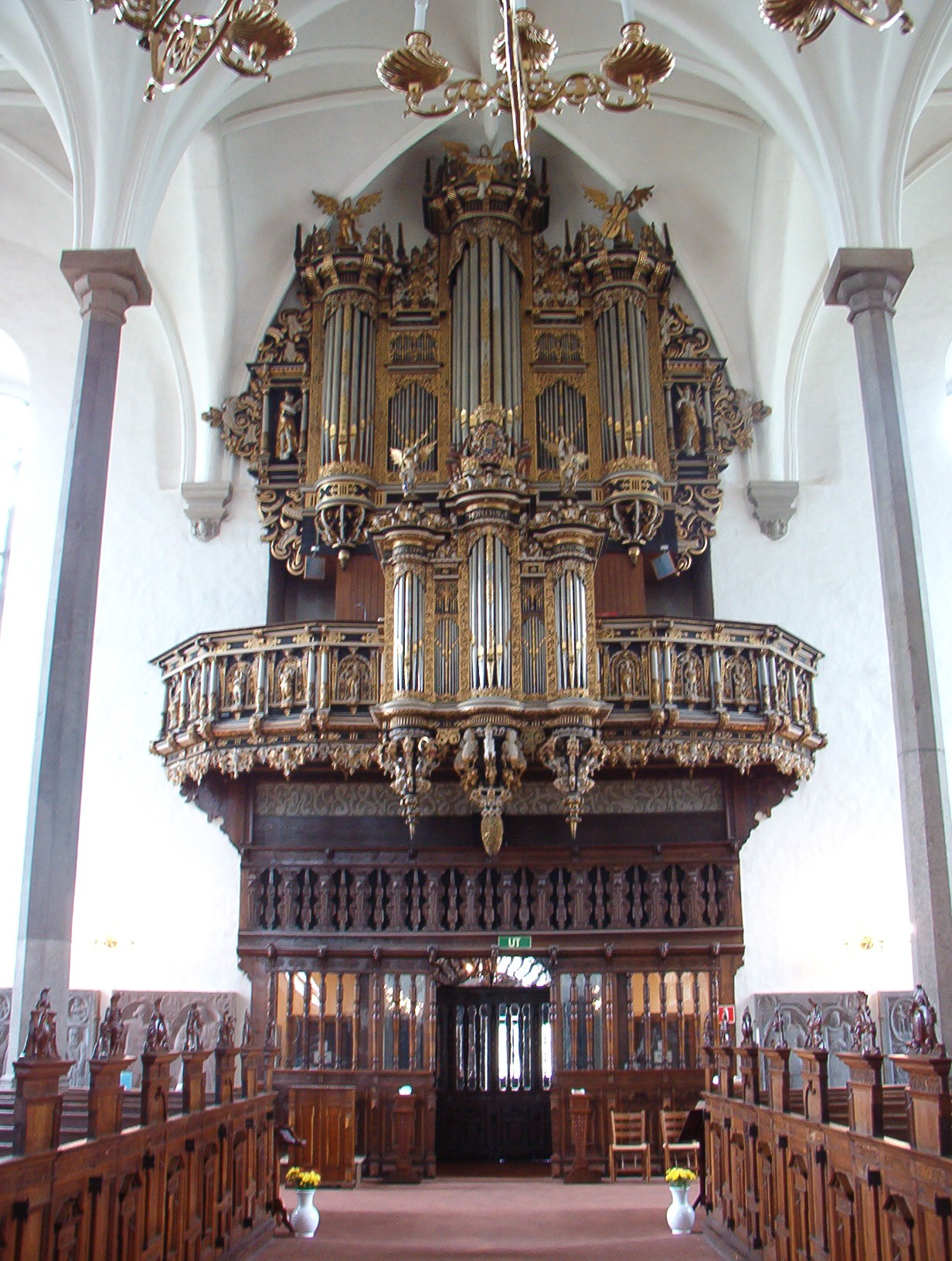 Date Aug 2005